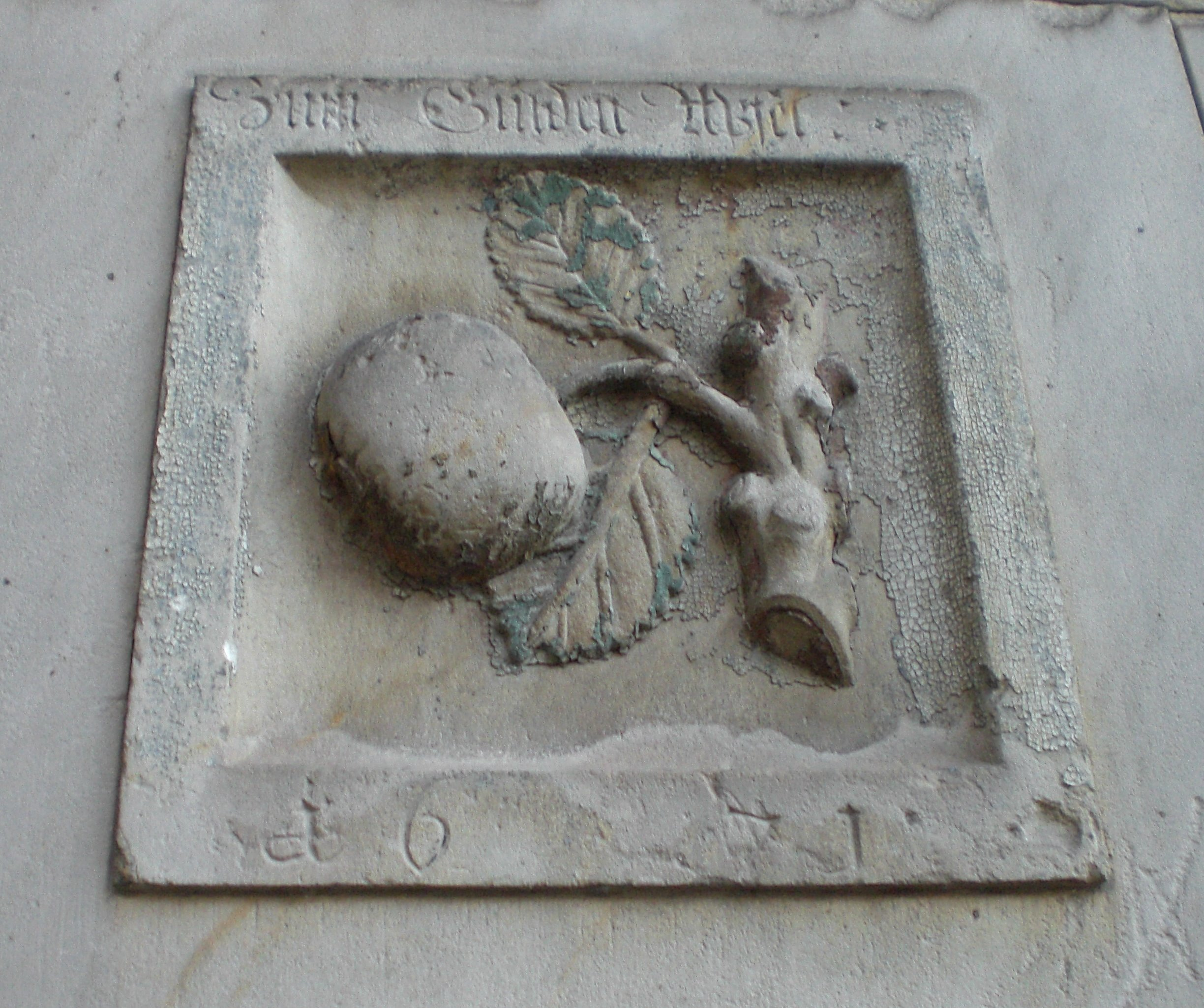 Hauszeichen "Zum Gülden Apfel" beim Eisenbarthbrunnen in Magdeburg